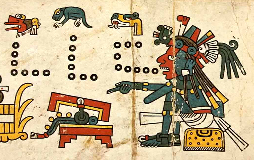 Immagine di Ehecatl dal Codice Fejèrvàry-Mayer.